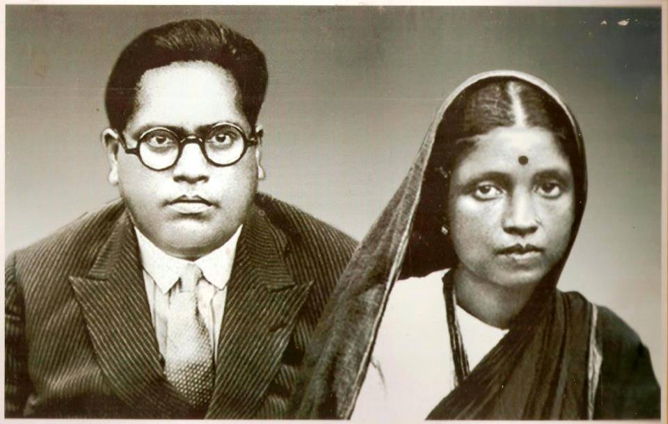 डॉ. बाबासाहेब आंबेडकर पत्नी रमाबाई समवेत, इ.स. १९३४